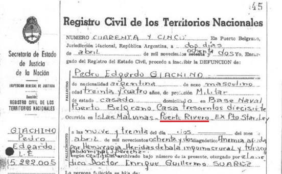 Acta de defunción de Pedro Edgardo Giachino, primer caído en combate de la Guerra de las Malvinas el 2 de abril de 1982. Allí se puede leer que falleció en "Puerto Rivero, Ex Pto. Stanley", también llamado Puerto Argentino.